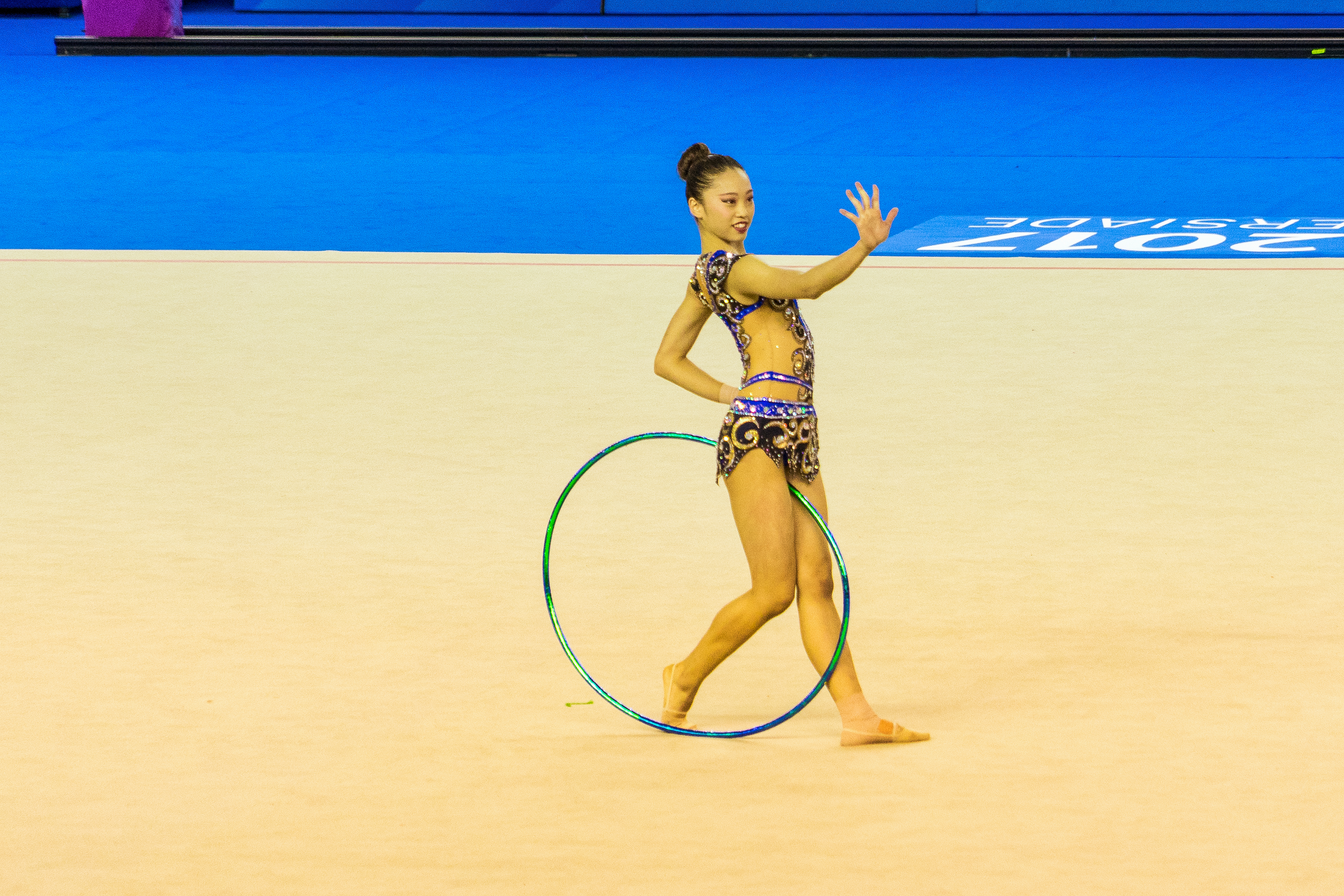 2017 Taipei Summer Universiade